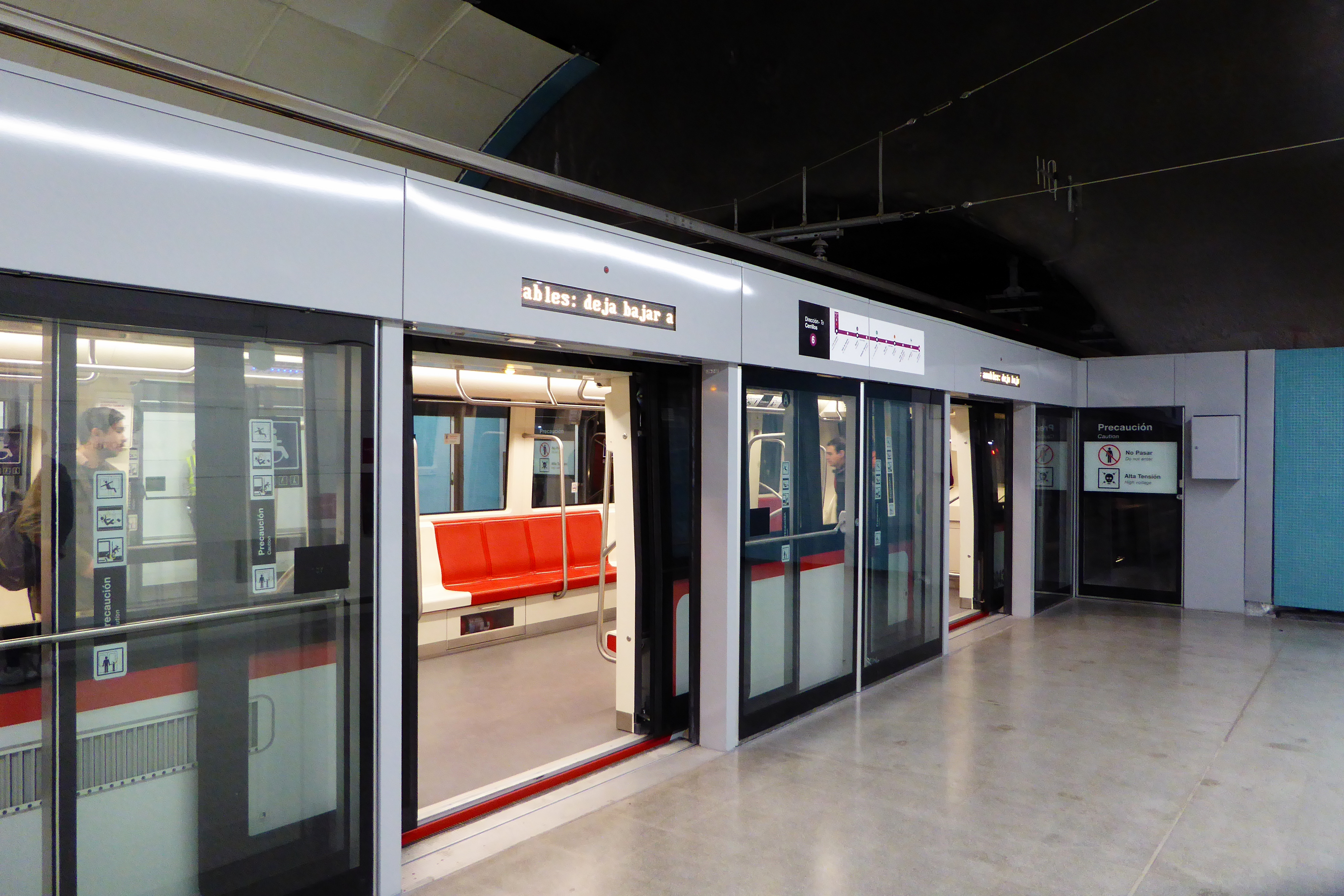 Puertas de andén en estación Los Leones, Línea 6 del Metro de Santiago.